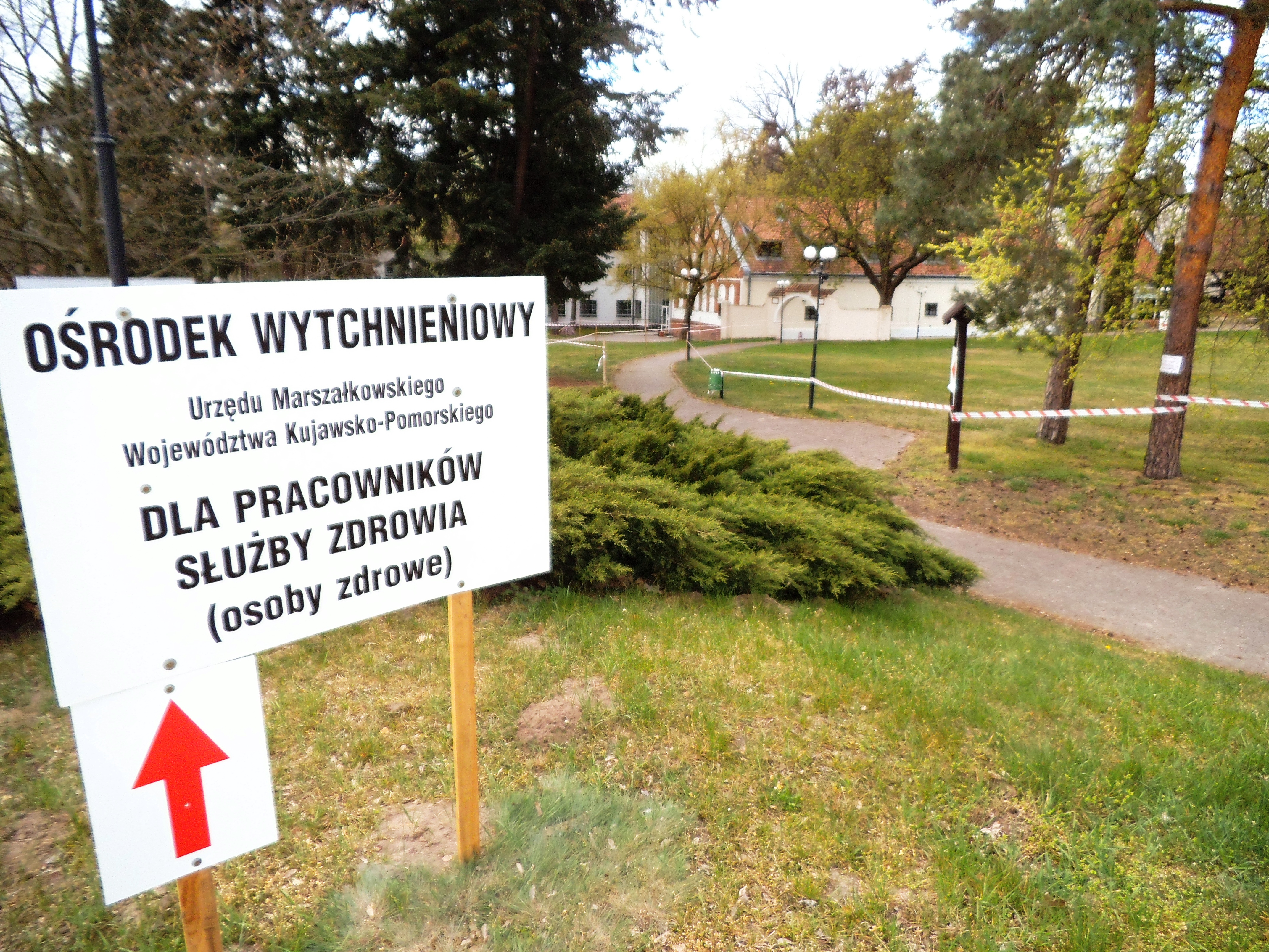 Budynek Bursy Akademickiej w Przysieku, 2020